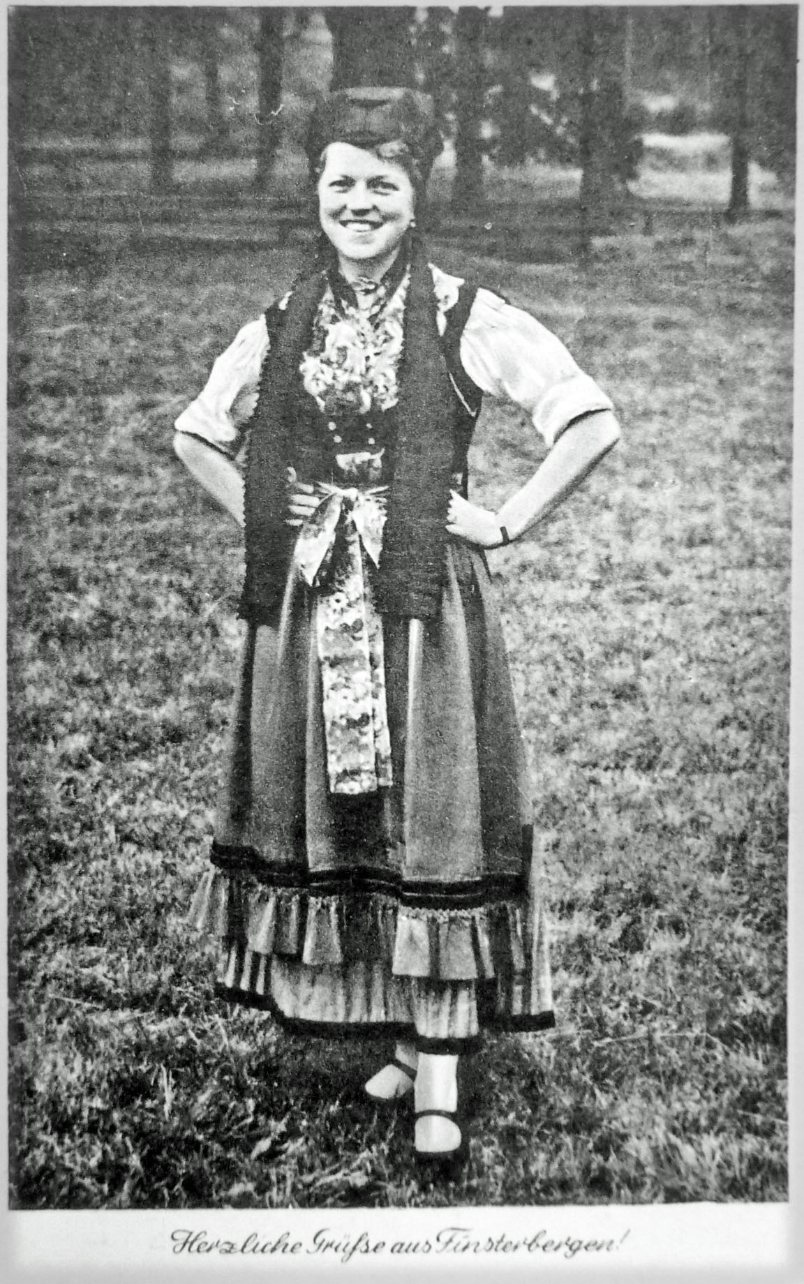 Finsterberger Tracht (Alte Postkarte aus den 1930er Jahren)